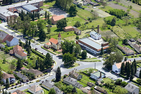 Légi fotó